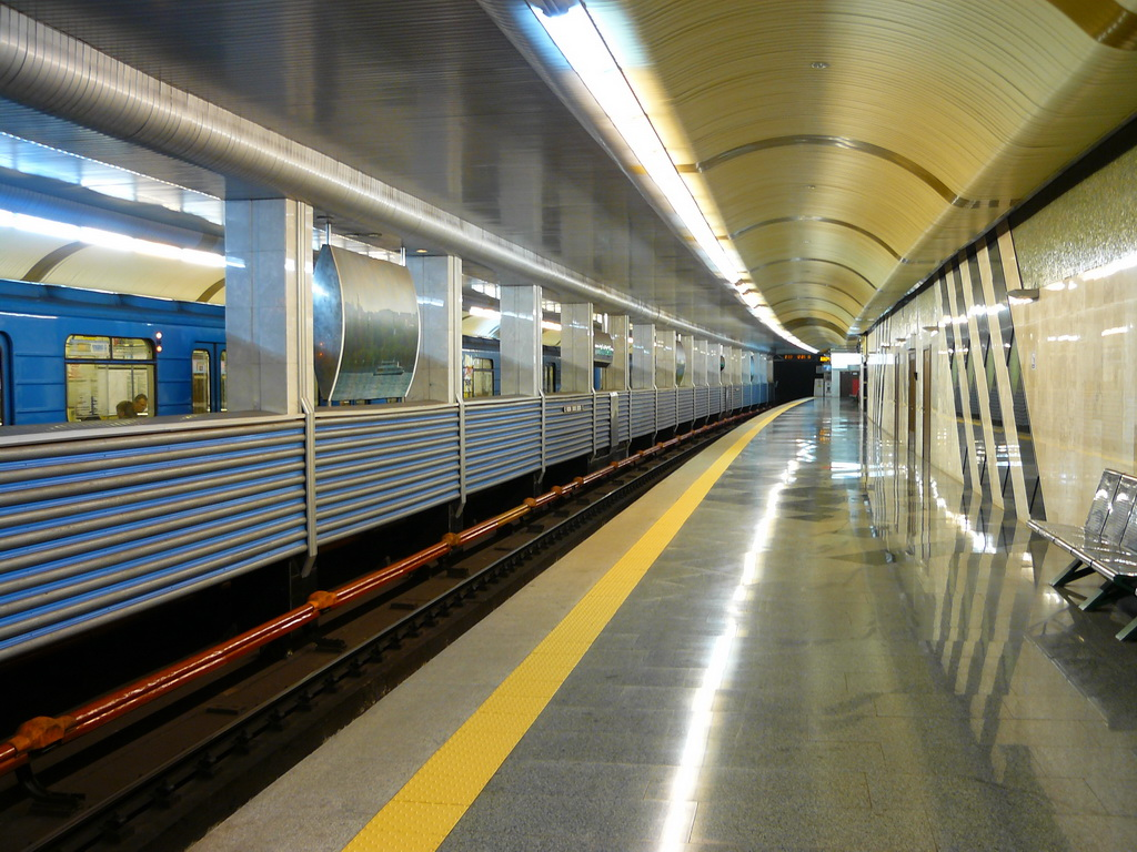 Станция метро «Вырлица» в Киеве